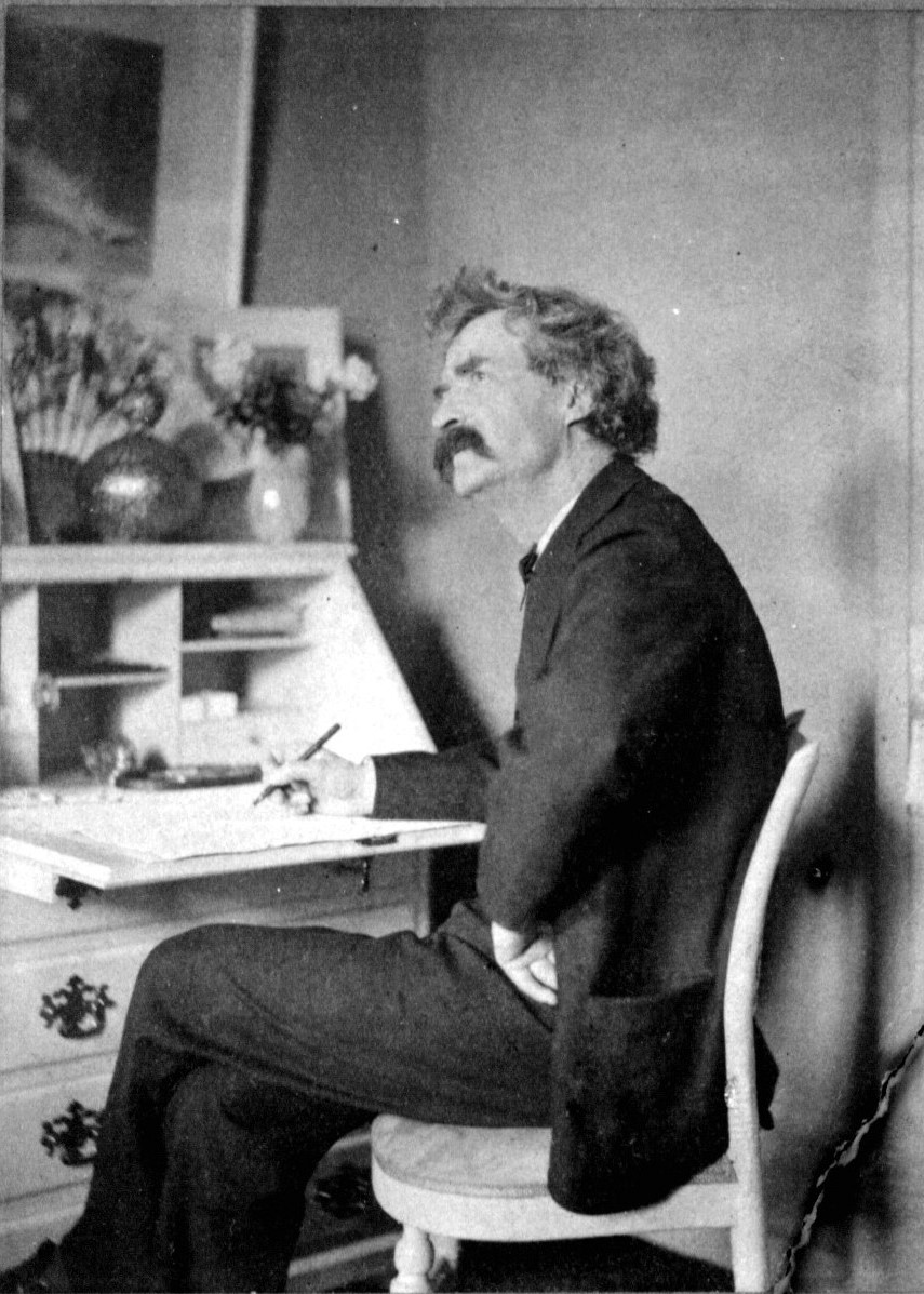 Mark Twain